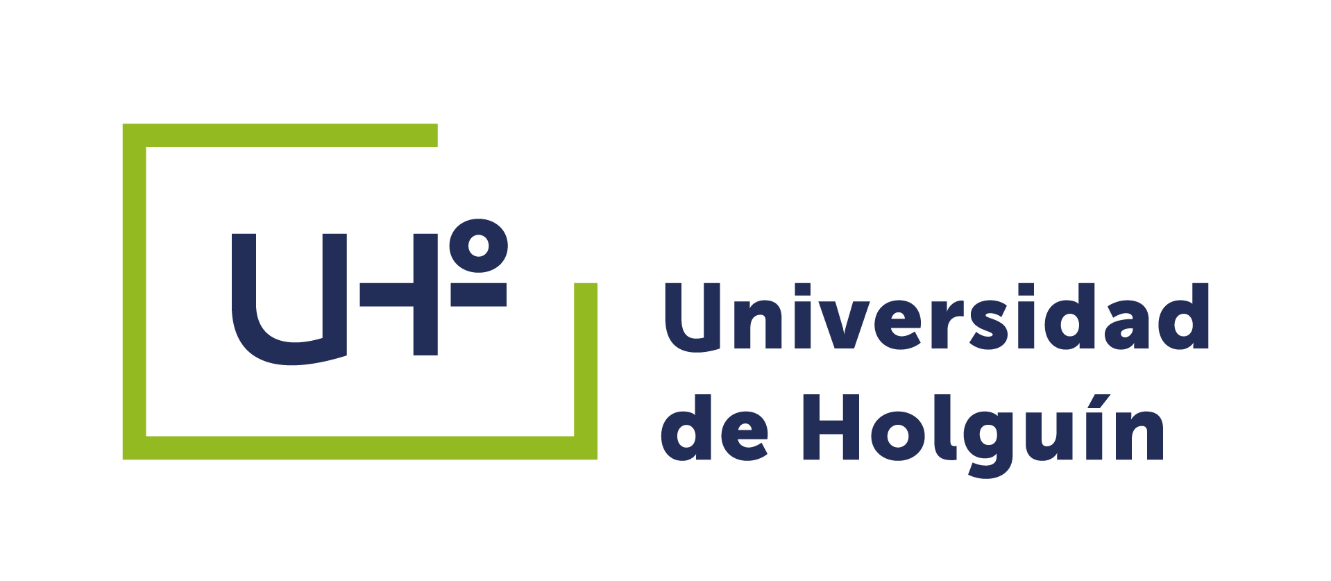 Identificador de la Universidad de Holguín